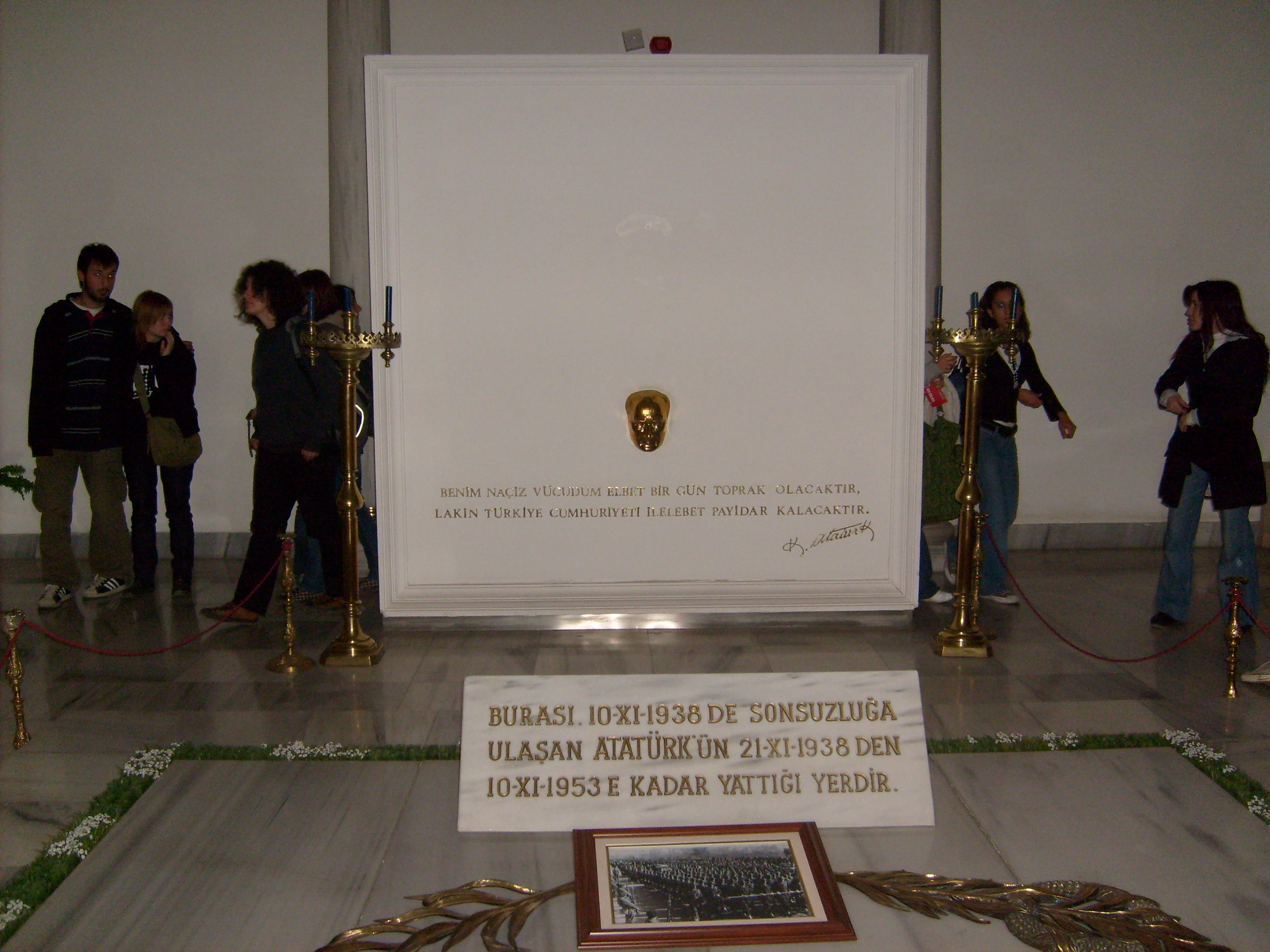 Ankara Etnografya Müzesi, ölümünden sonra Atatürk'ün birkaç yıl yattığı yer